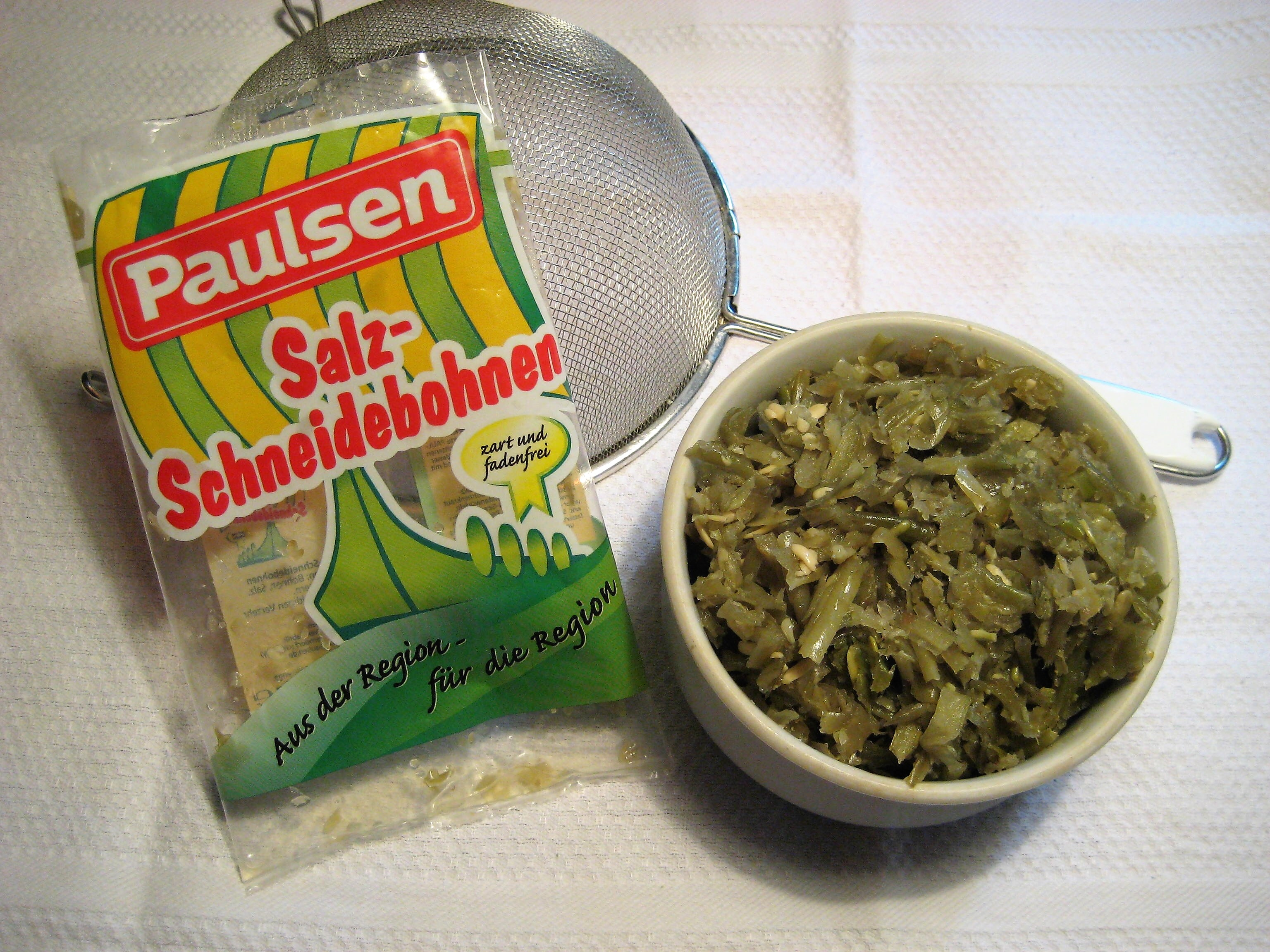 Handelsübliche Salz-Schneidebohnen (die aus der Packung entnommenen Bohnen sind hier noch ungewässert)]